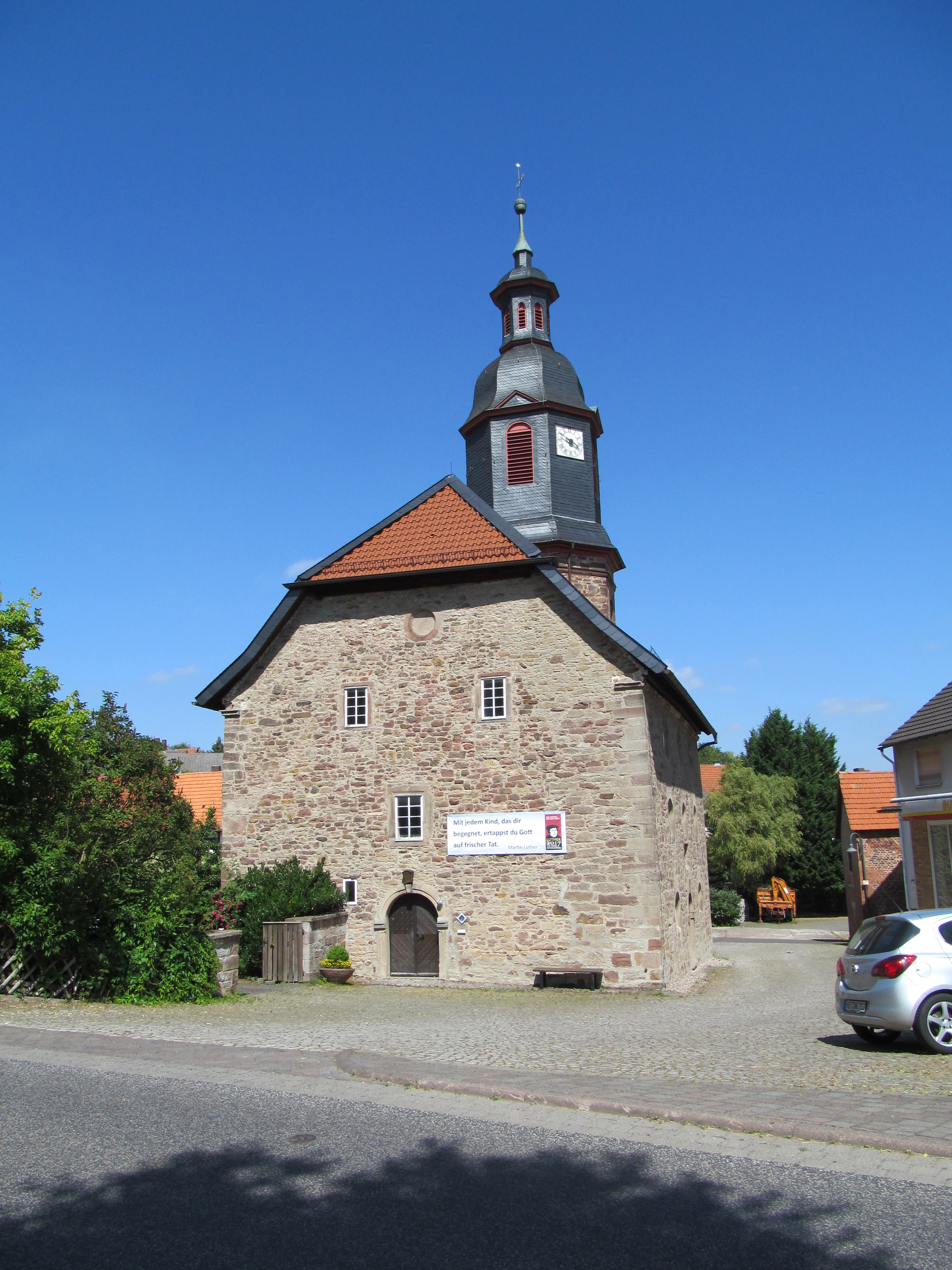 die Kirche von Mansbach